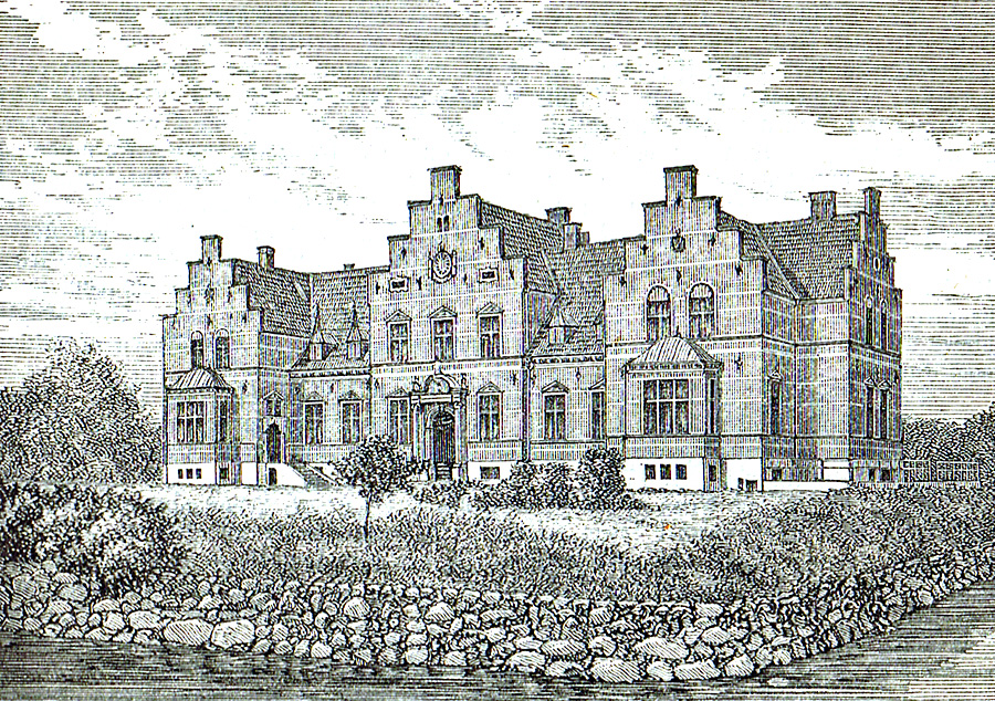 Fuglsang er en gammel borg, som nævnes i 1423. Fuglsang er nu en avlsgård under Corselitze. Gården ligger i Toreby Sogn, Musse Herred, Maribo Amt, Nykøbing Falster Kommune. Hovedbygningen er opført i 1868-1869